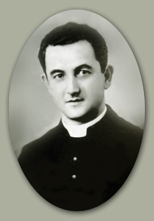 Luís Victor Sartori. (A moldura é um acréscimo digital).